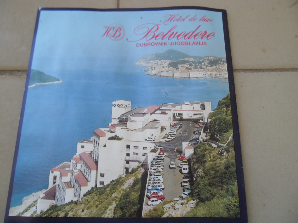 dubrovački hotel Belvedere prije Domovinskog rata